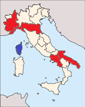 Carte d'Italie Administrative